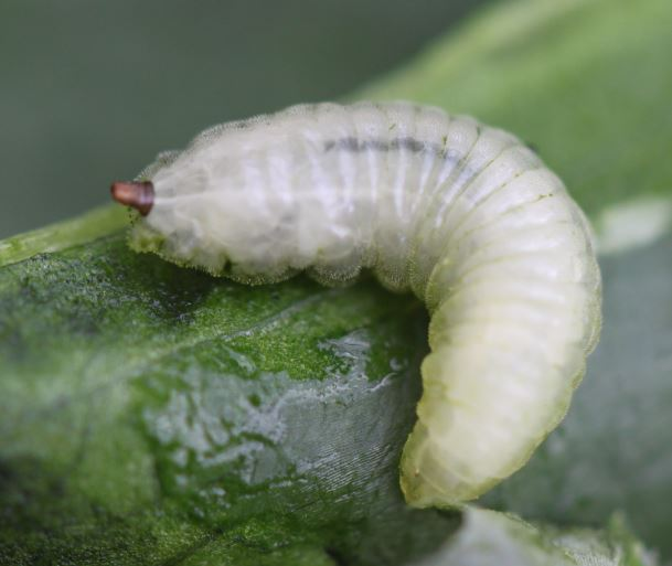 Fliegenmade in einer Mine in einem Bärlauchblatt, vermutlich Cheilosia fasciata""; am 3. Mai 2019 in einem Wald nahe Walldorf/Baden